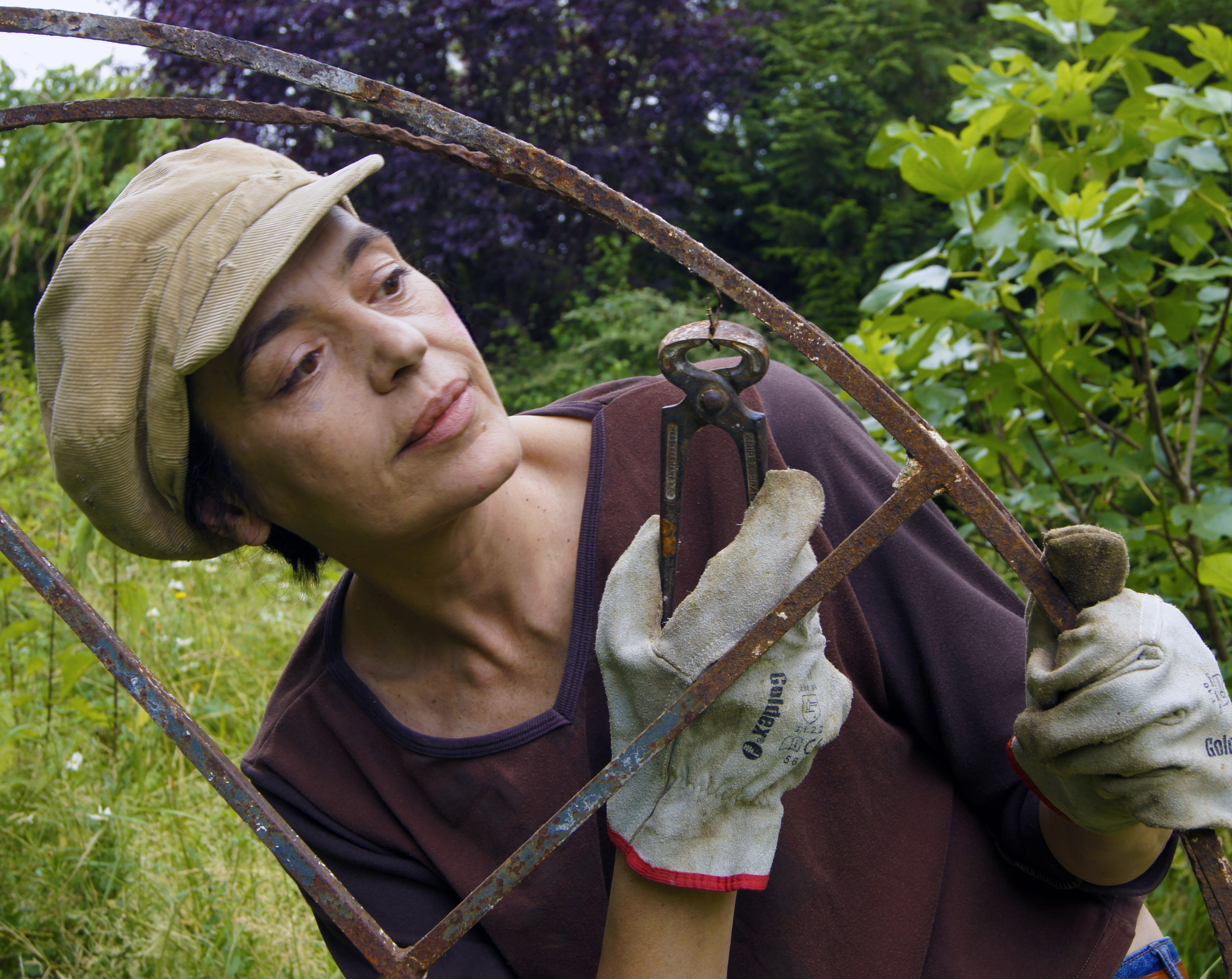 Guil trabajando